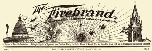 The Firebrand, journal anarchiste américain.